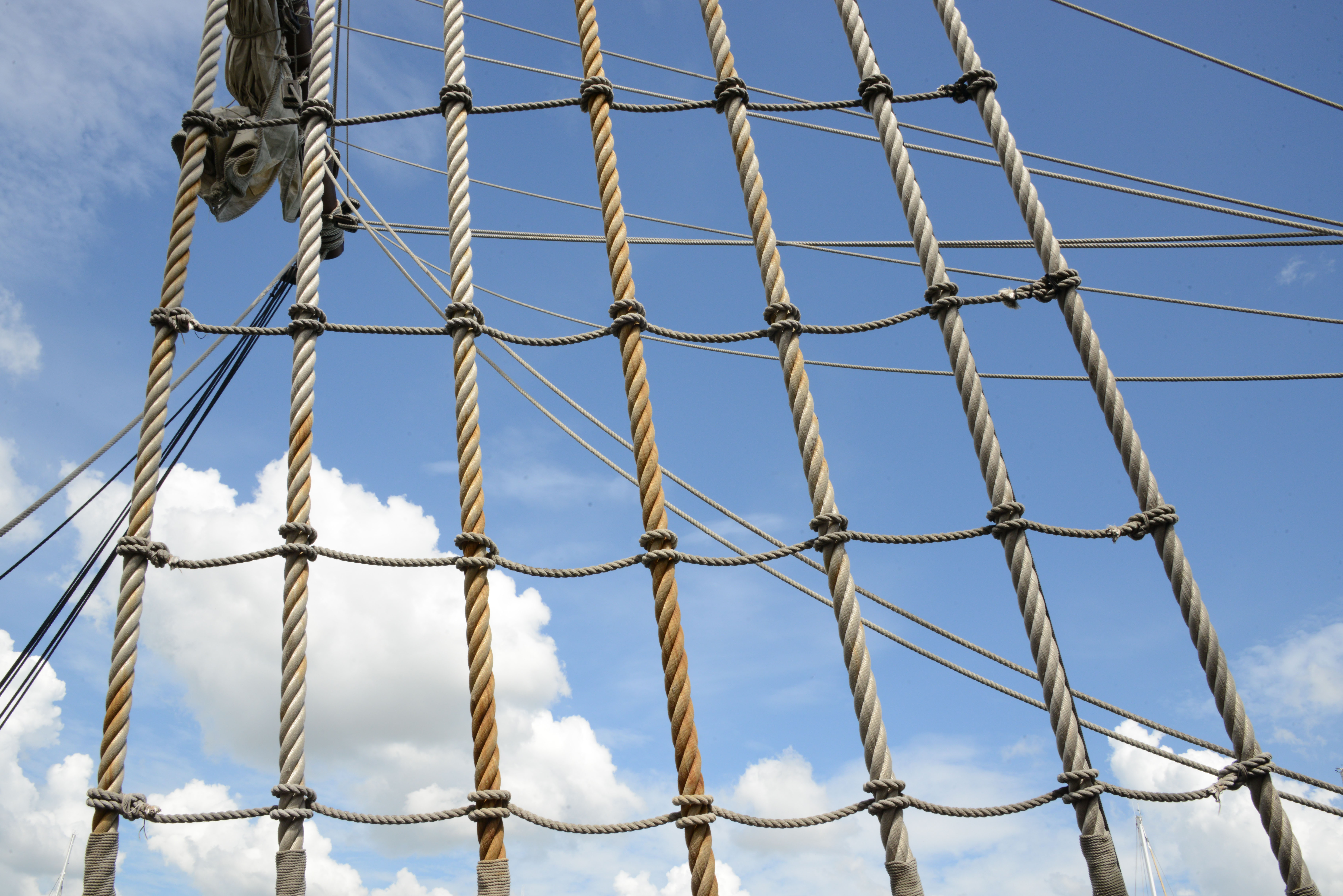 Elément du « Galeón Andalucía » photographié depuis les ponts du navire. La Rochelle, Charente-Maritime, France.